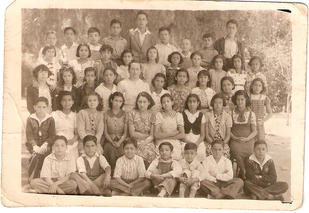 Rosario Gutierrez Eskildsen con grupo de Primaria en la Cd. de México, aproximadamente en 1934